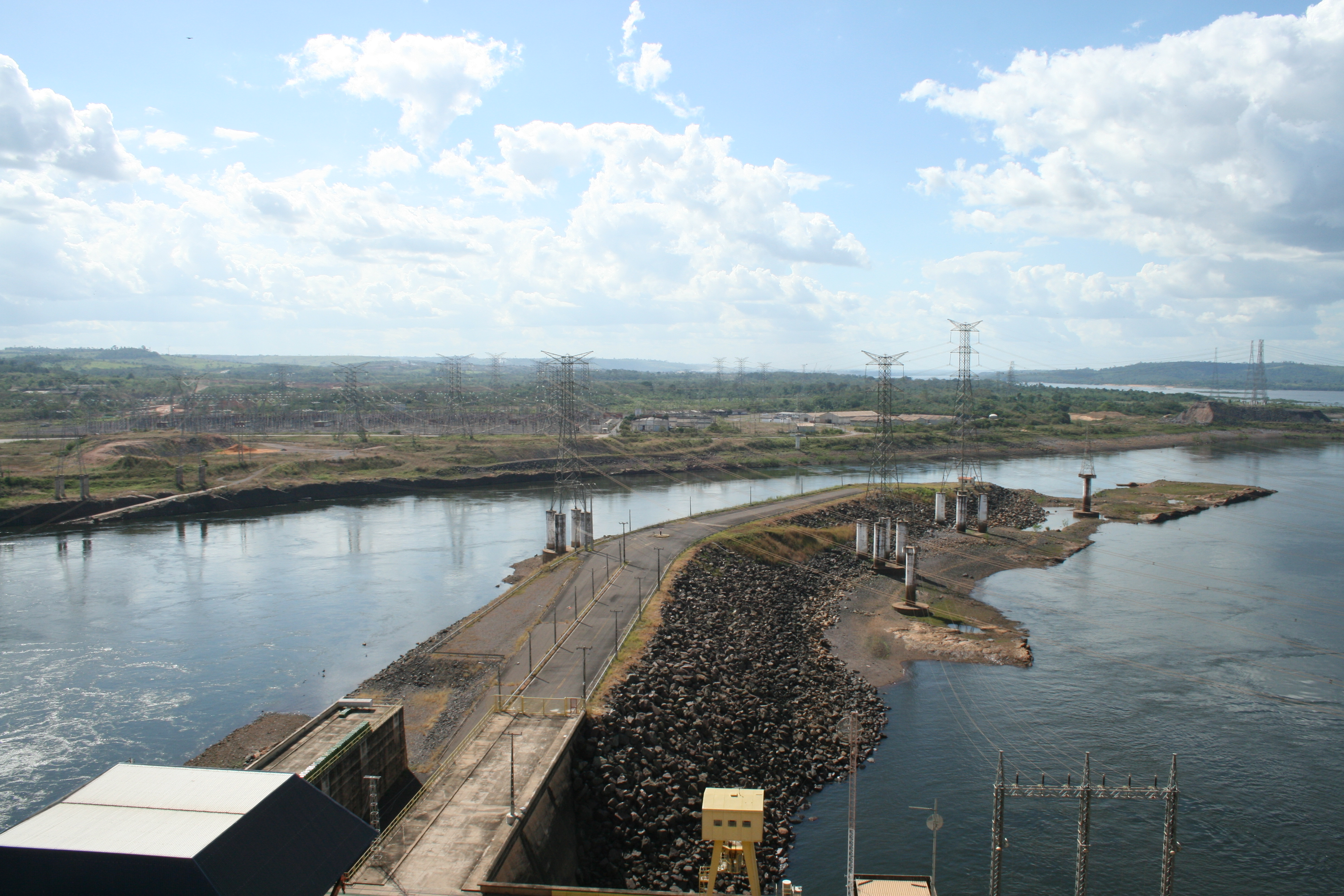 Cabos de transmissão de energia.